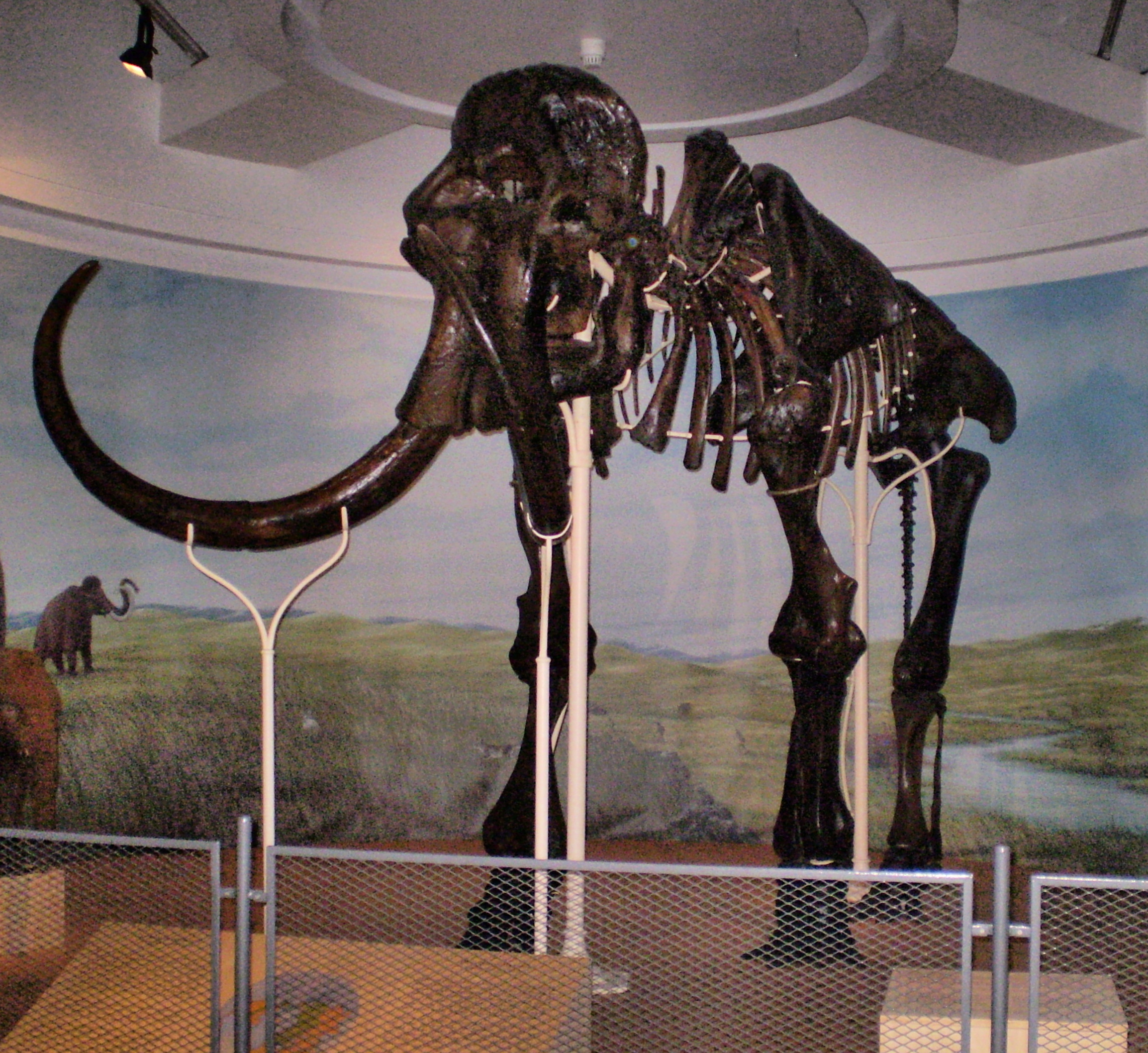 Mammouth fossilisé, découvert à Lierre (Belgique) en 1859 - Institut Royal des Sciences naturelles de Belgique, Bruxelles